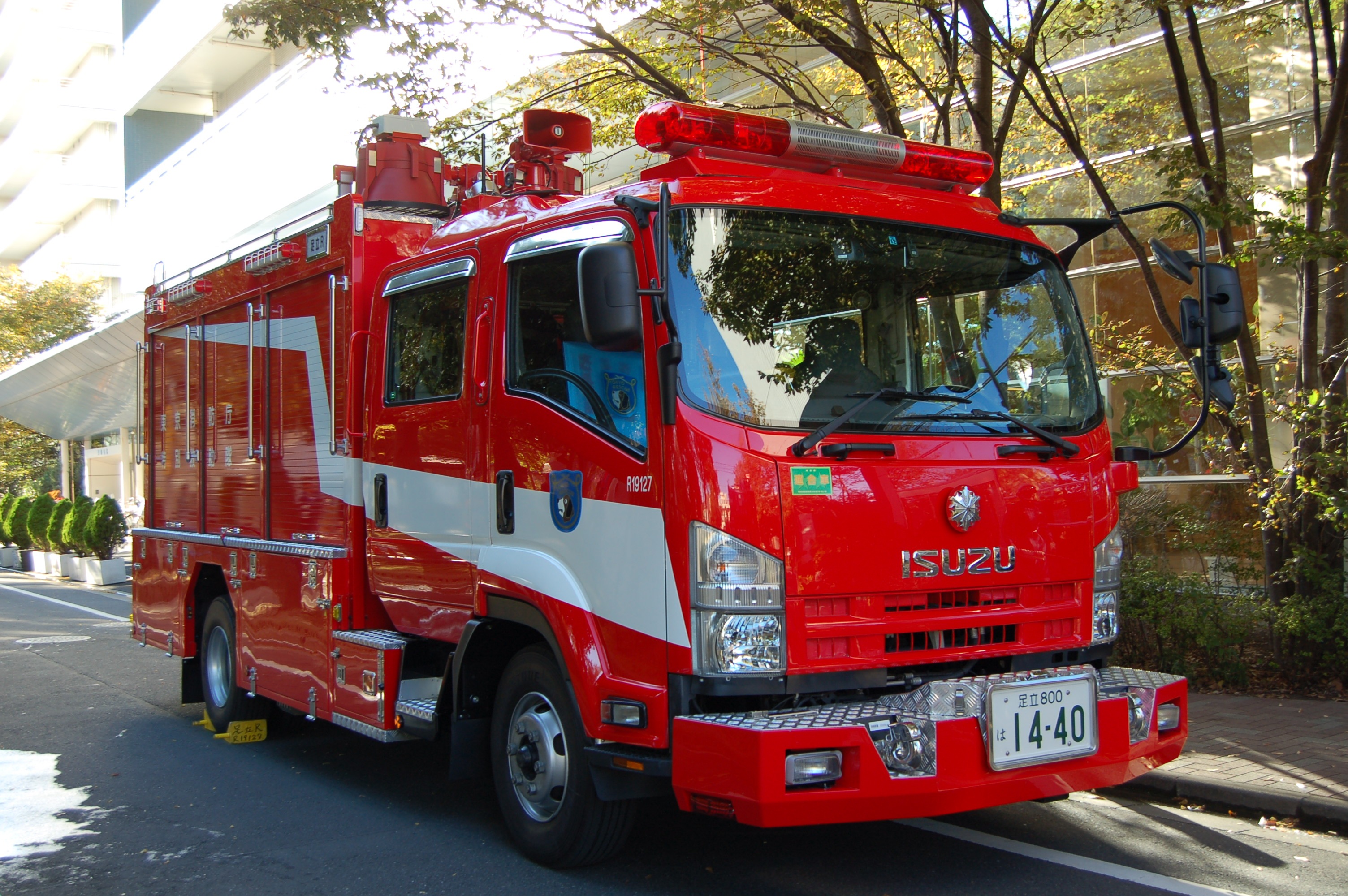 足立消防署Ⅱ型救助工作車